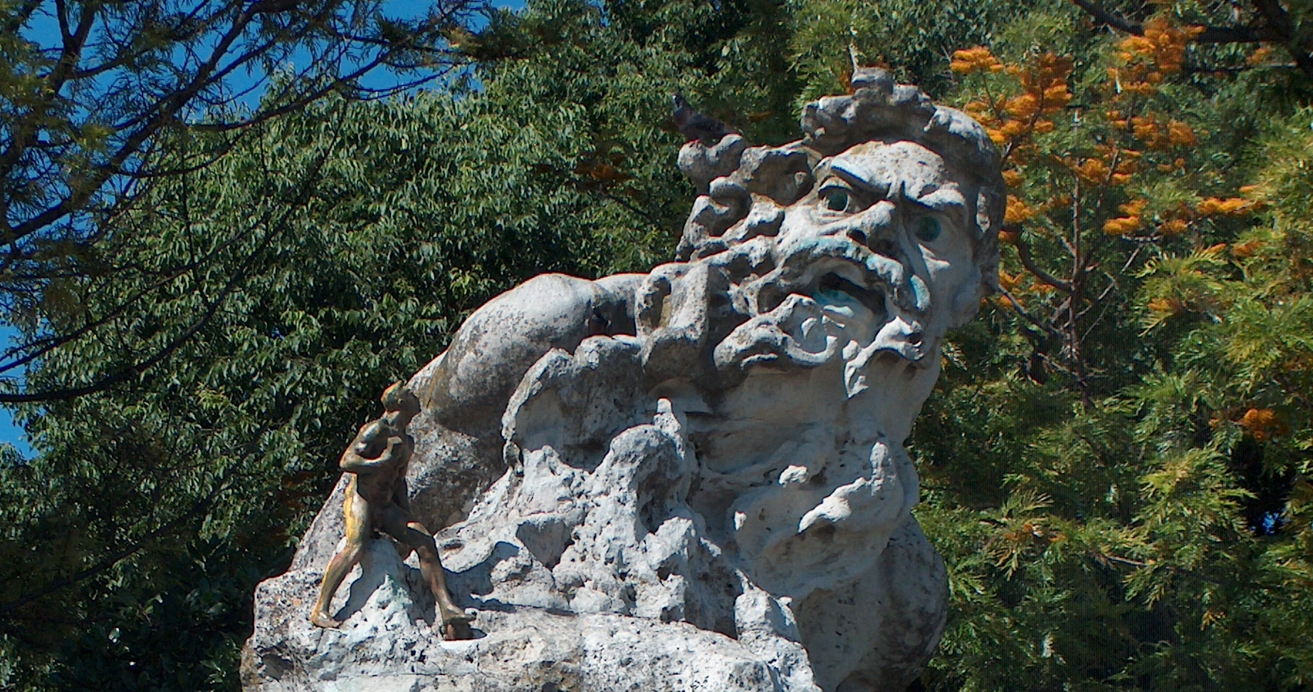 Adamastor (mitologia).Obra de Júlio Vaz Júnior, inaugurada em 1927 no miradouro de Santa Catarina, Lisboa, Portugal.